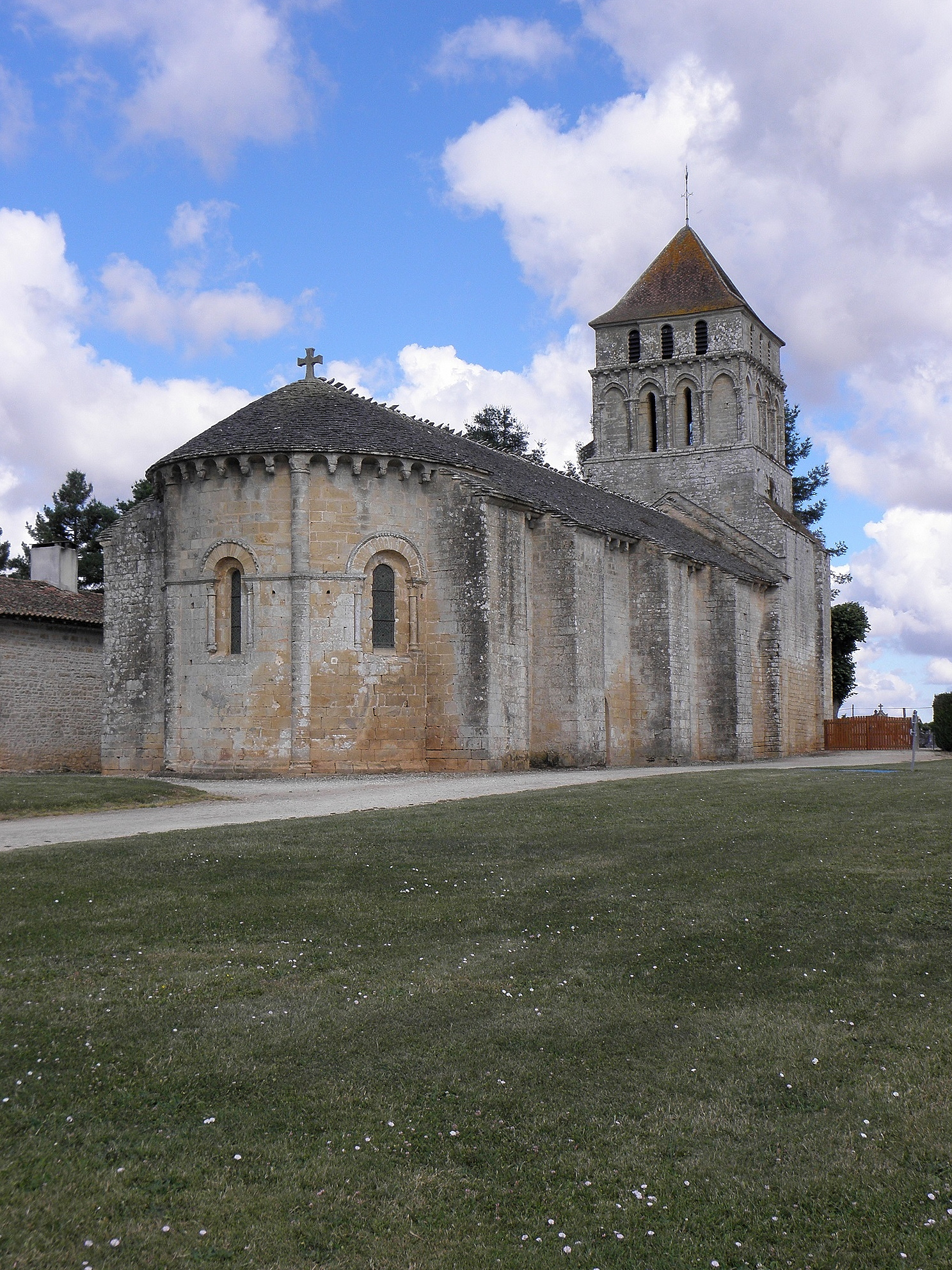 Église Notre-Dame de Clussais-la-Pommeraie (79). Chevet et flanc nord.